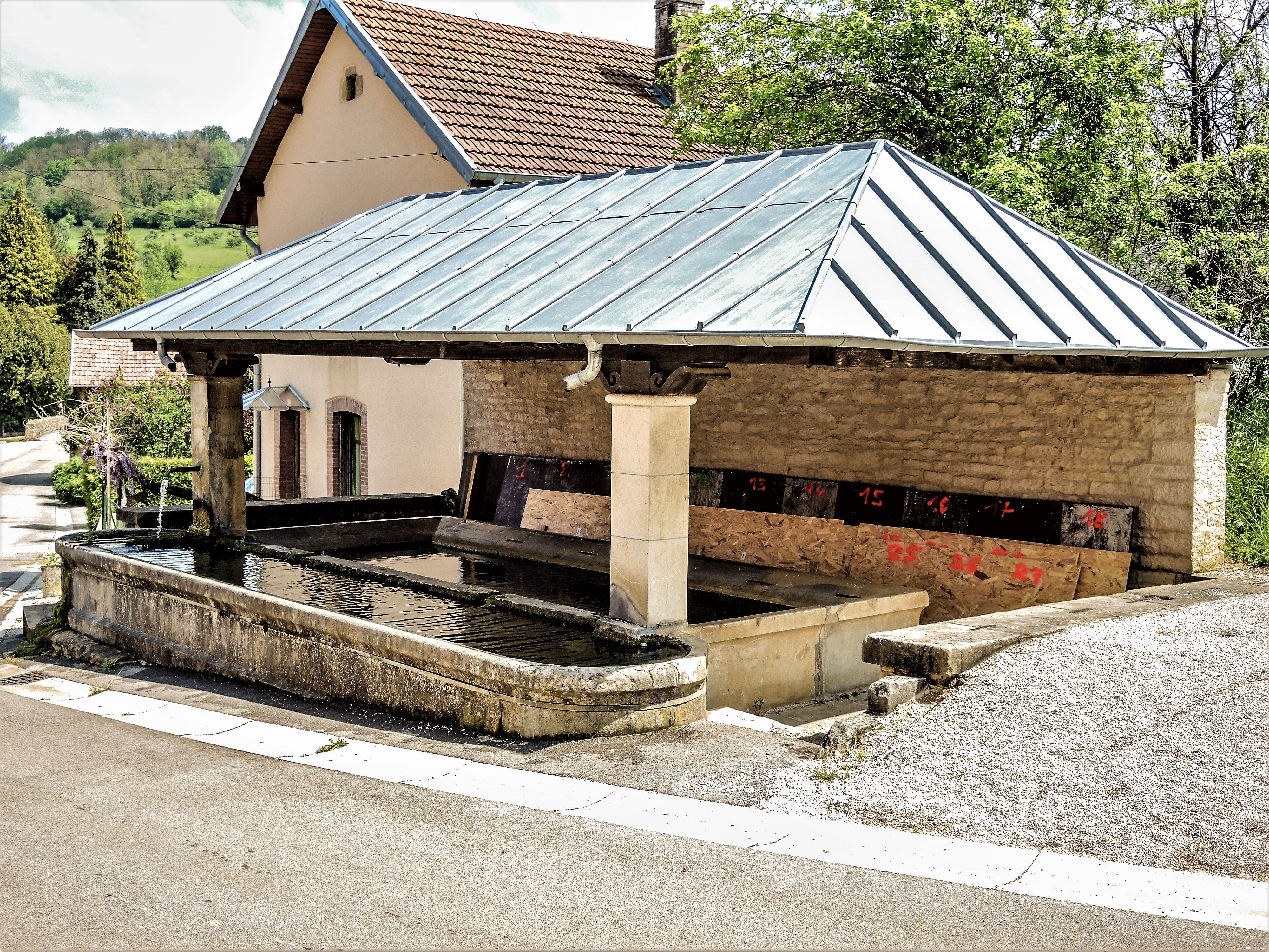 Fontaine-lavoir-abreuvoir, couverte.